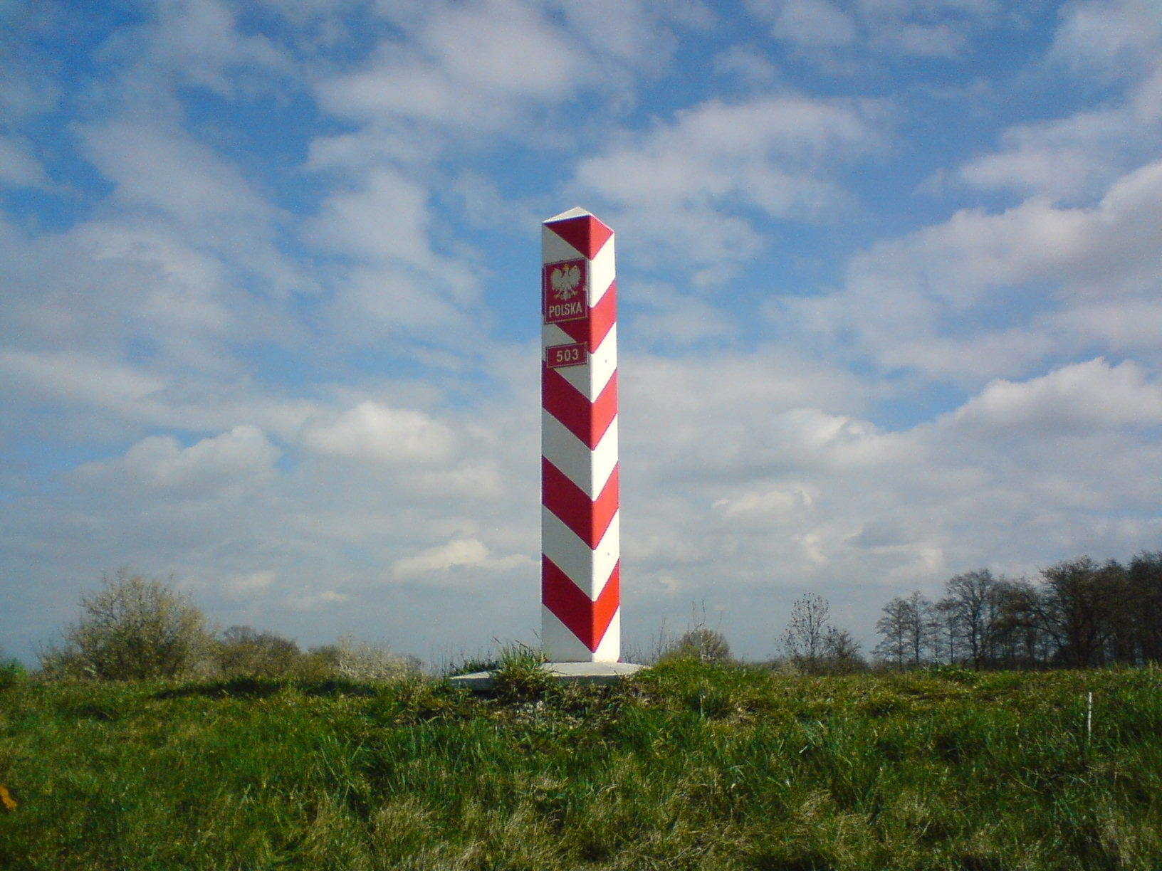 Znak graniczny nr 503 na wale przeciwpowodziowym w okolicach Nowego Lubusza w gminie Słubice.